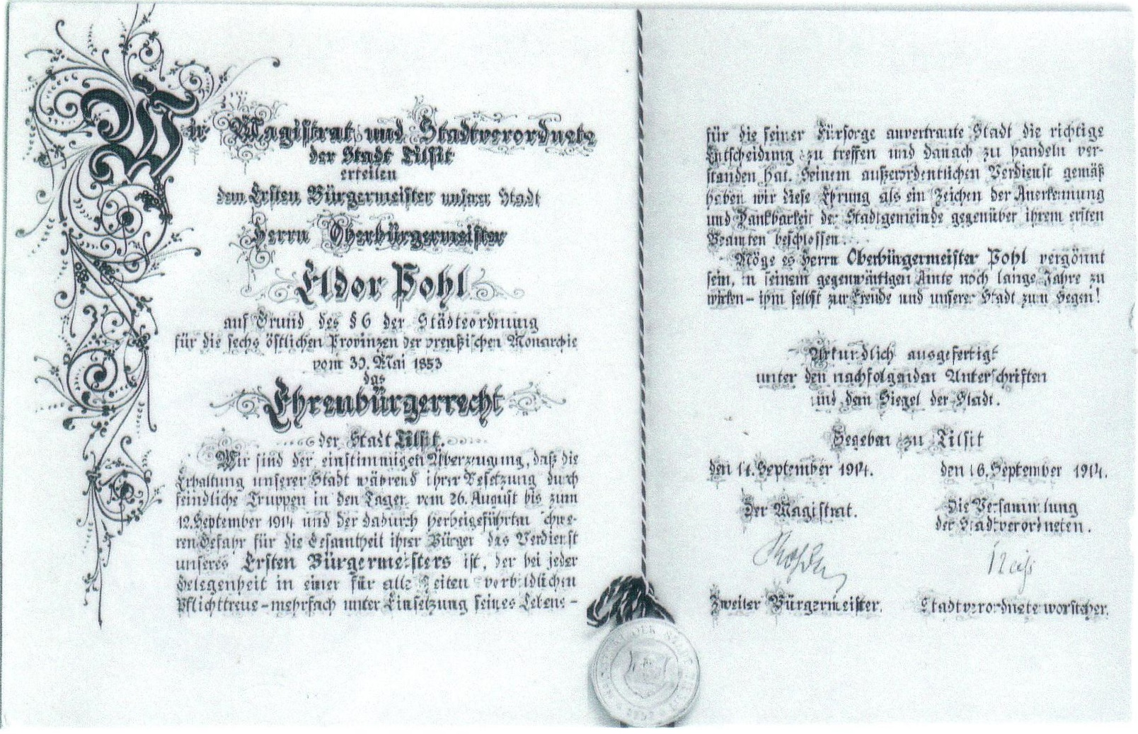 Ehrenbürgerurkunde der Stadt Tilsit für Eldor Pohl